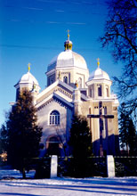 Церква у м. Олесько. 1891 р., архітектор В. Нагірний (1848—1921)